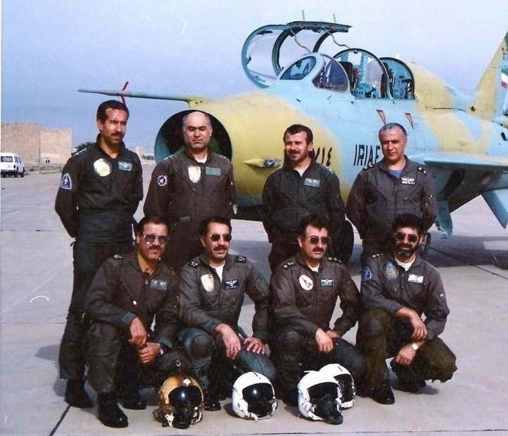 سرتیپ خلبان علی اشرف بهرامی‌پناه (ایستاده اولین نفر از چپ)